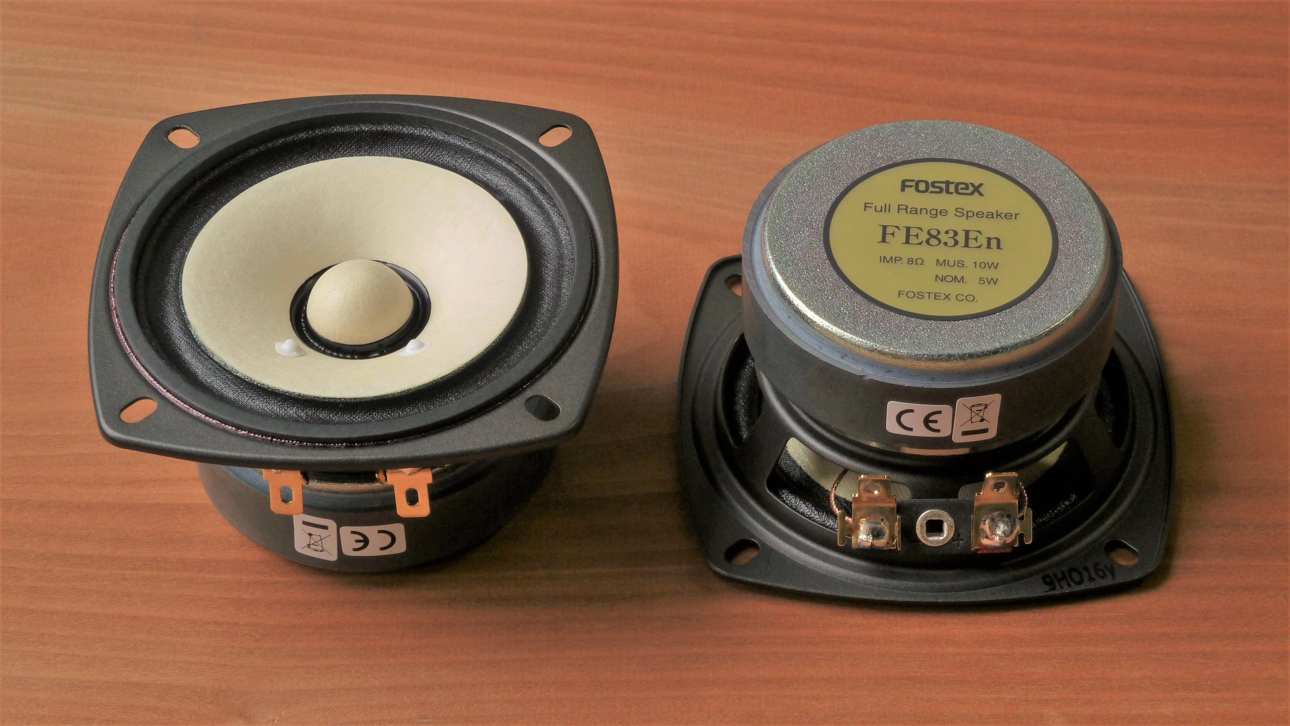 FOSTEXの8cmフルレンジスピーカーユニット・FE83En